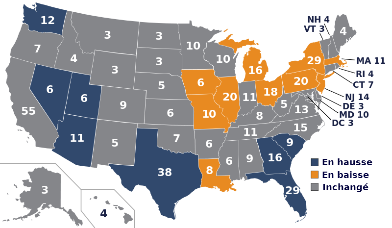 Collège électoral pour les élections présidentielles américaines de 2012, 2016, 2020 réajusté d'après les données du recensement de 2010.